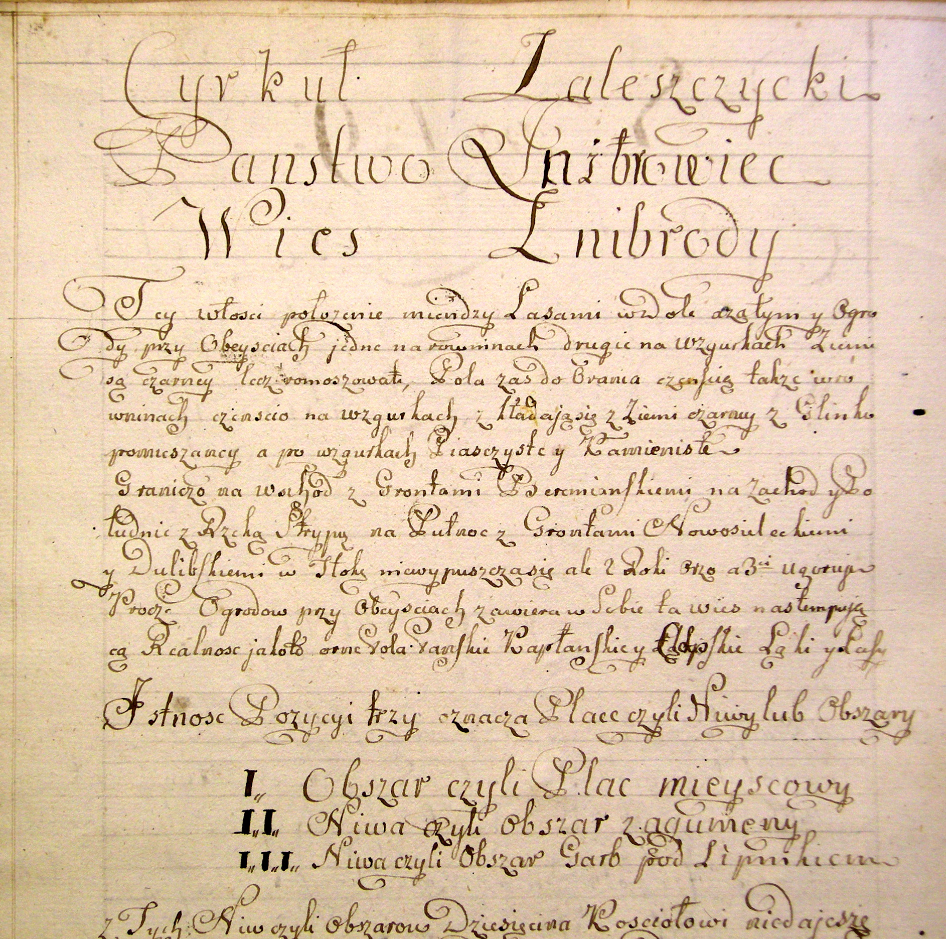 Фрагмент Йосифинської метрики с. Жнибороди Заліщицького циркулу Королівства Галичини та Володимирії Австро-Угорської імперії.